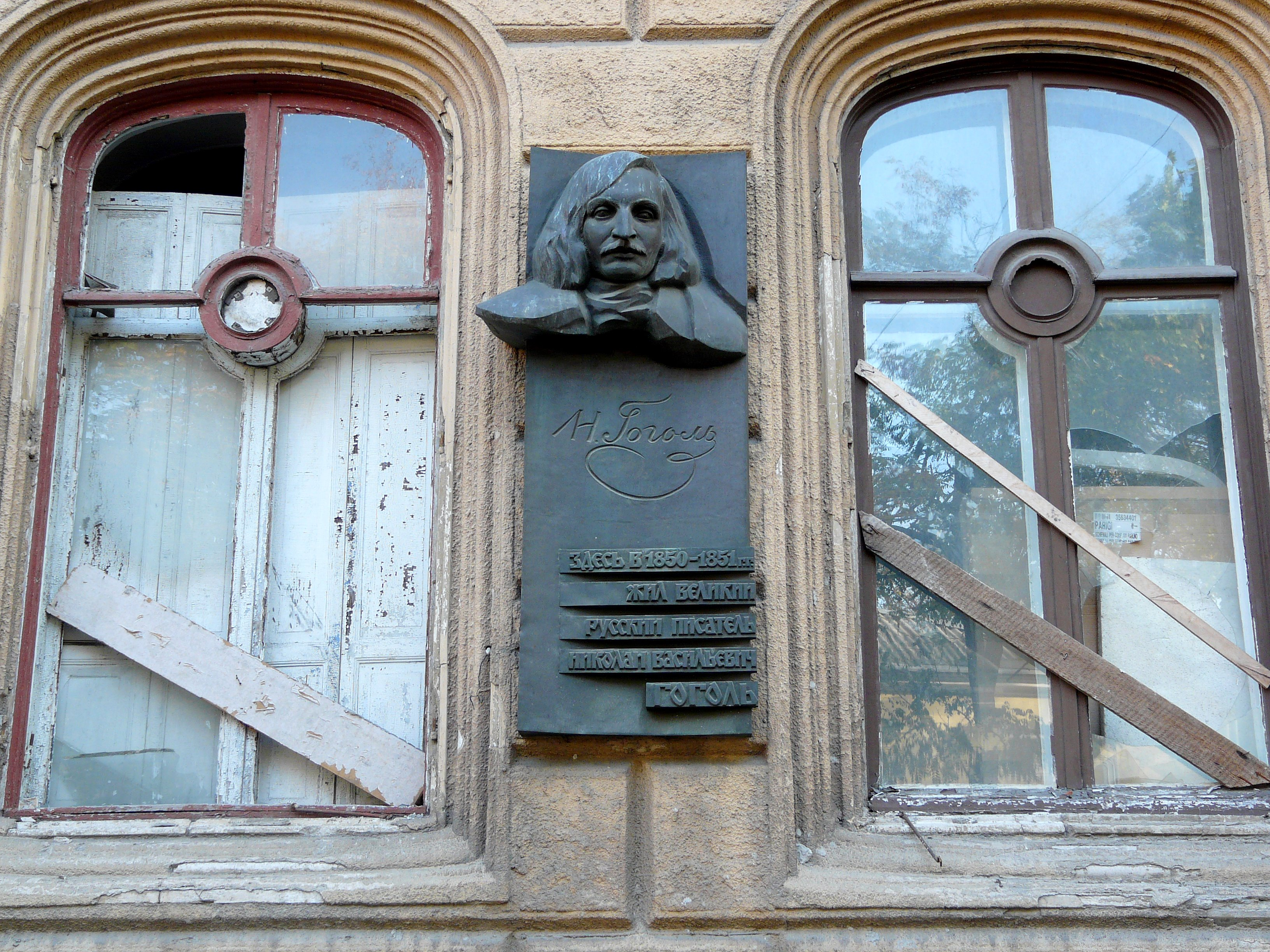 Будинок житловий та флігель Трощинського, в якому жив М.В. Гоголь – російський письменник, Одеса, Гоголя вул., 11